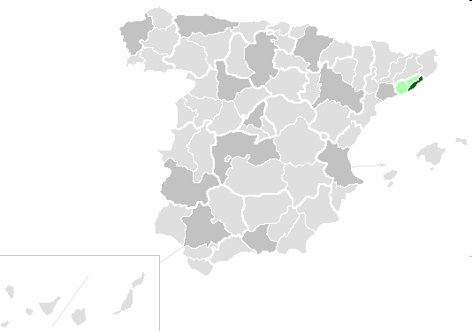 Territorio de la Archidiócesis de Barcelona, Mapa